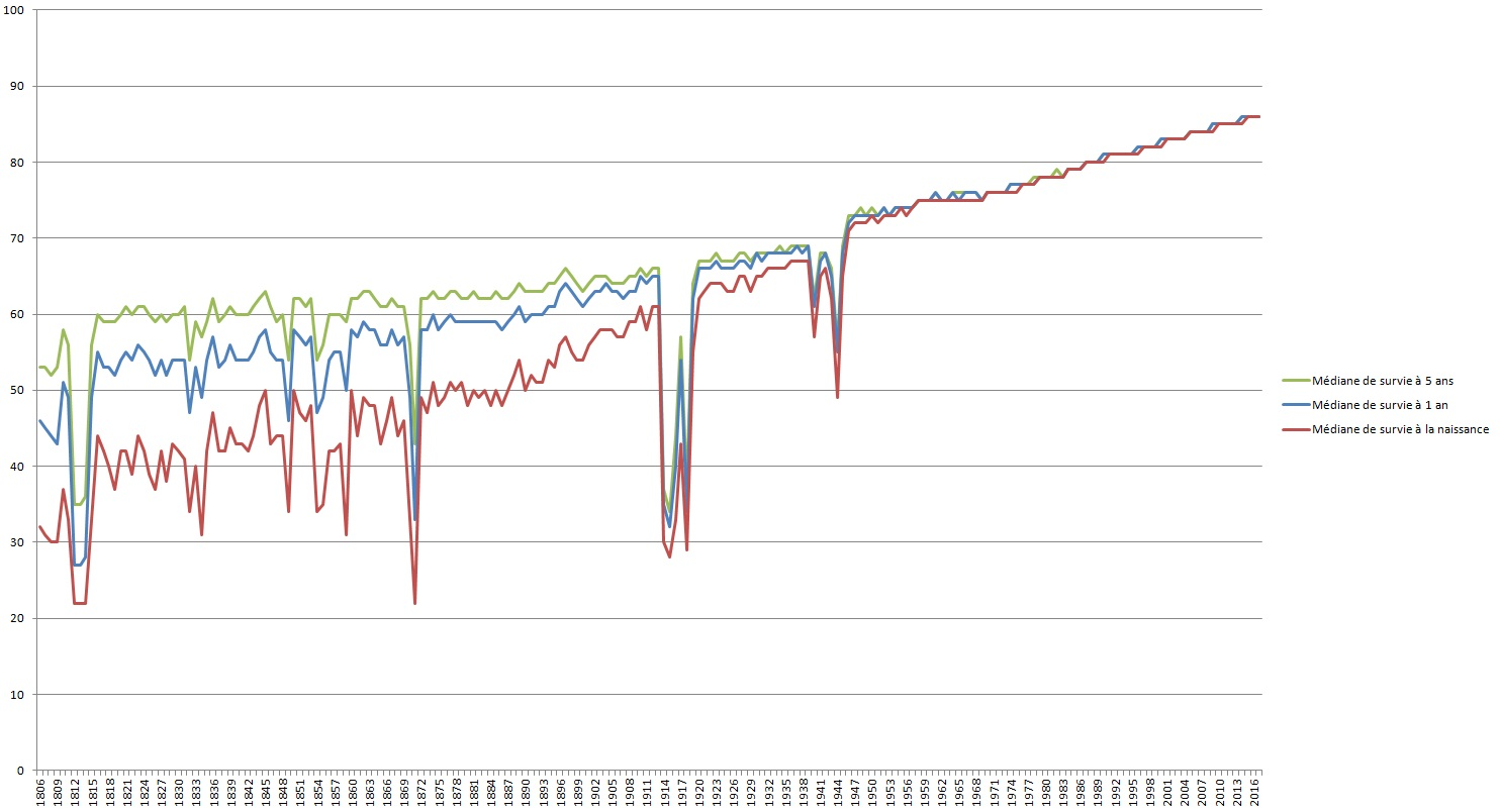 Évolution de la médiane de survie en France de 1806 à 2017 (Source: INED) Définitions: - Médiane de survie à la naissance: âge à partir duquel 50% de la population est morte. - Médiane de survie à 1 an: âge à partir duquel 50% de la population ayant survécu au moins 1 an est morte. - Médiane de survie à 5 ans: âge à partir duquel 50% de la population ayant survécu au moins 5 ans est morte.